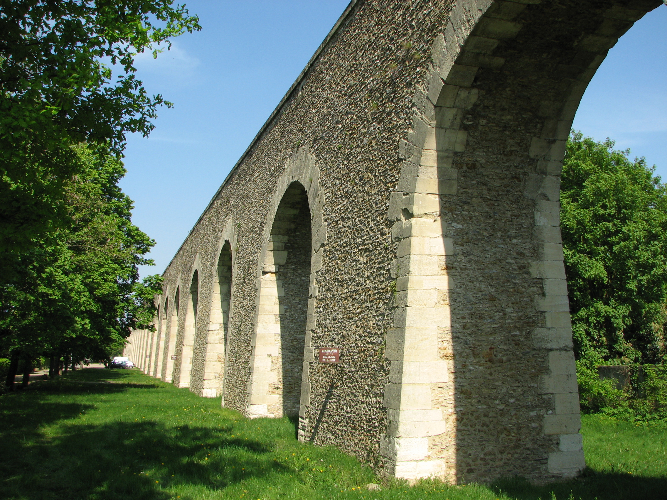 arches de l'aqueduc de Louveciennes vue du coté sud-ouest, non loin de la tour du Jongleur